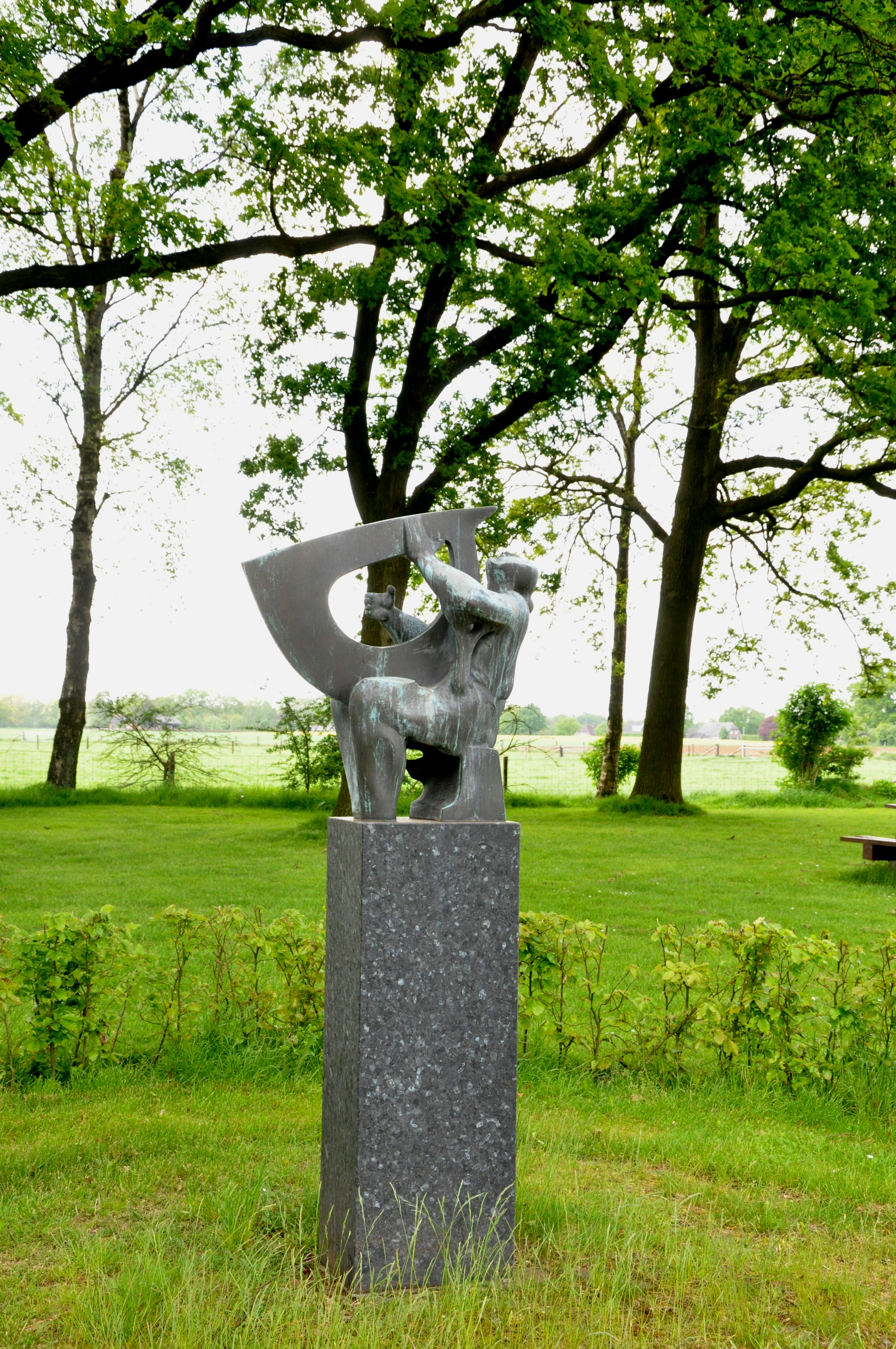 Beeld harpspeelster Emst, gem Epe